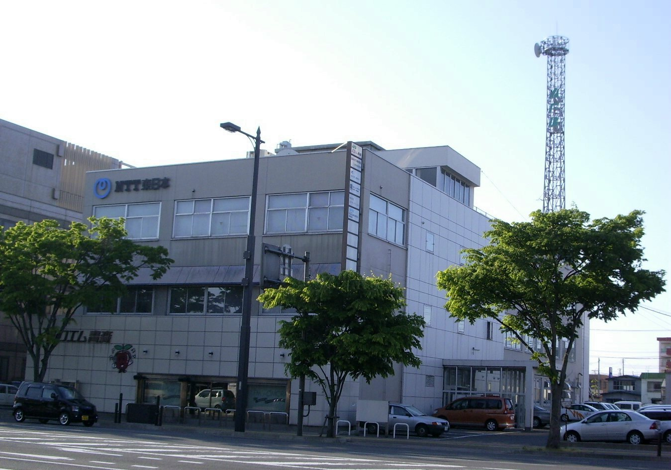 FM-Aomori